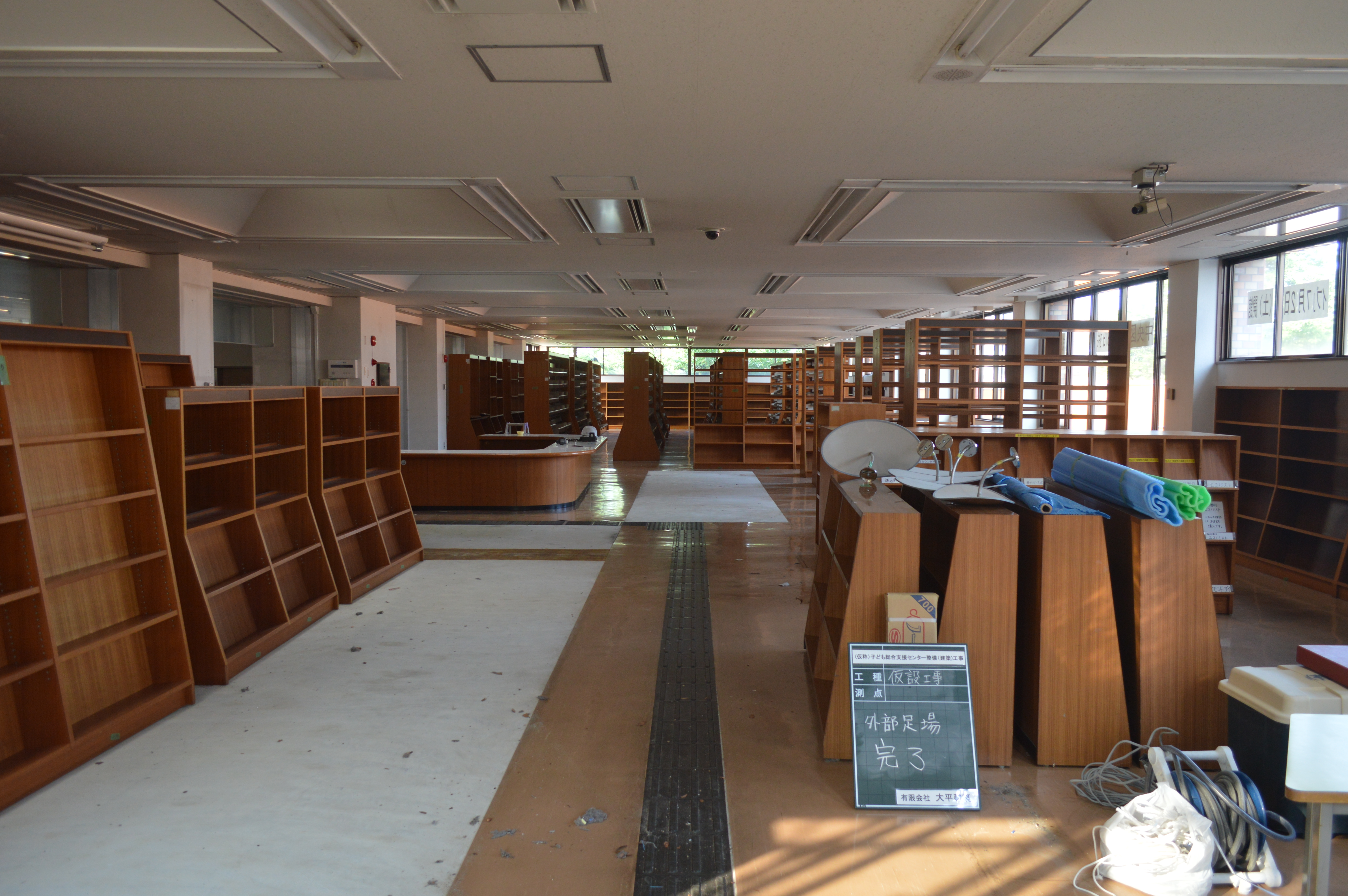 2016年3月30日をもって閉館したみよし市立中央図書館の旧館。同年7月撮影。2016年7月2日には約300m離れた場所に新館が開館している。